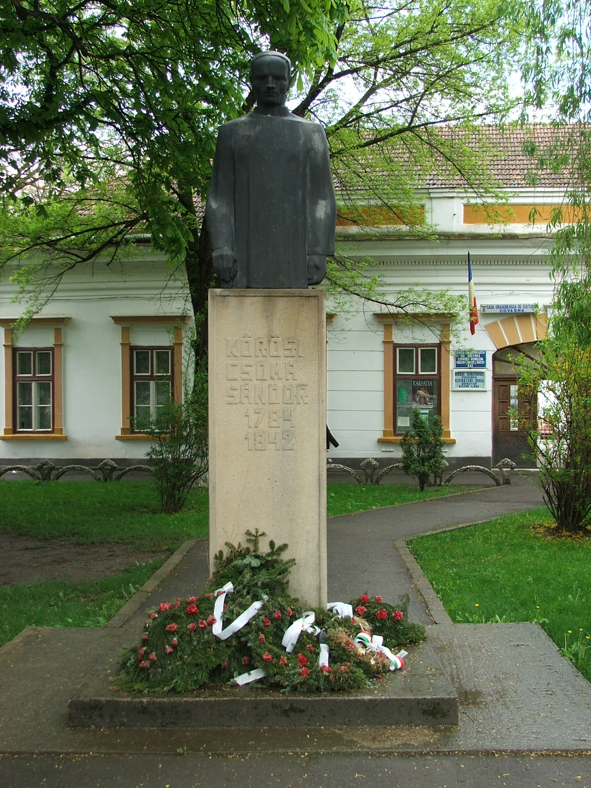 Kőrösi Csoma Sándor szobra (Jecza Péter, 1969) Kovásznán, 1918 december 1 u.[1]